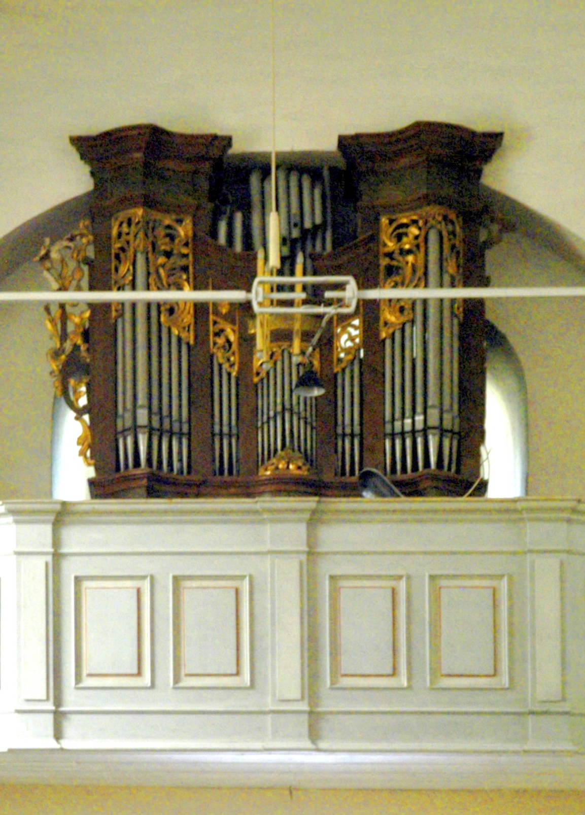 Orgel der kath. Pfarrkirche, hll. Peter und Paul